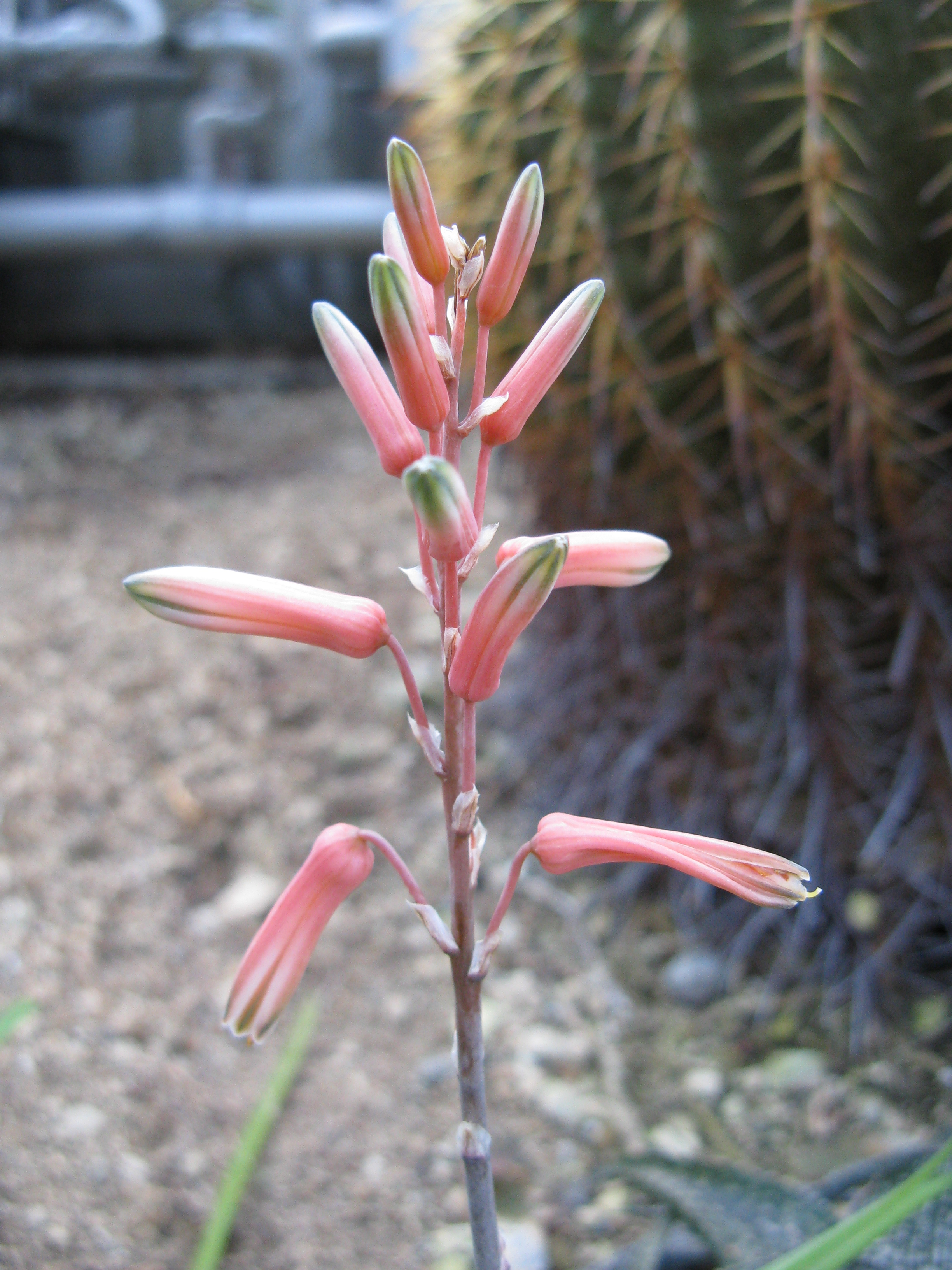 Aloe deltoideodonta Place:Osaka Prefectural Flower Garden,Osaka,Japan